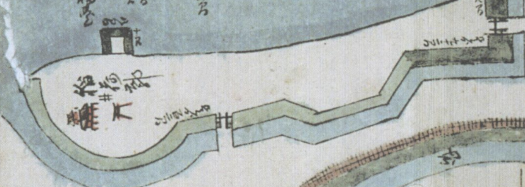 館林尾曳稲荷神社 秋元時代の稲荷郭 館林城絵図（秋元時代）より抜粋